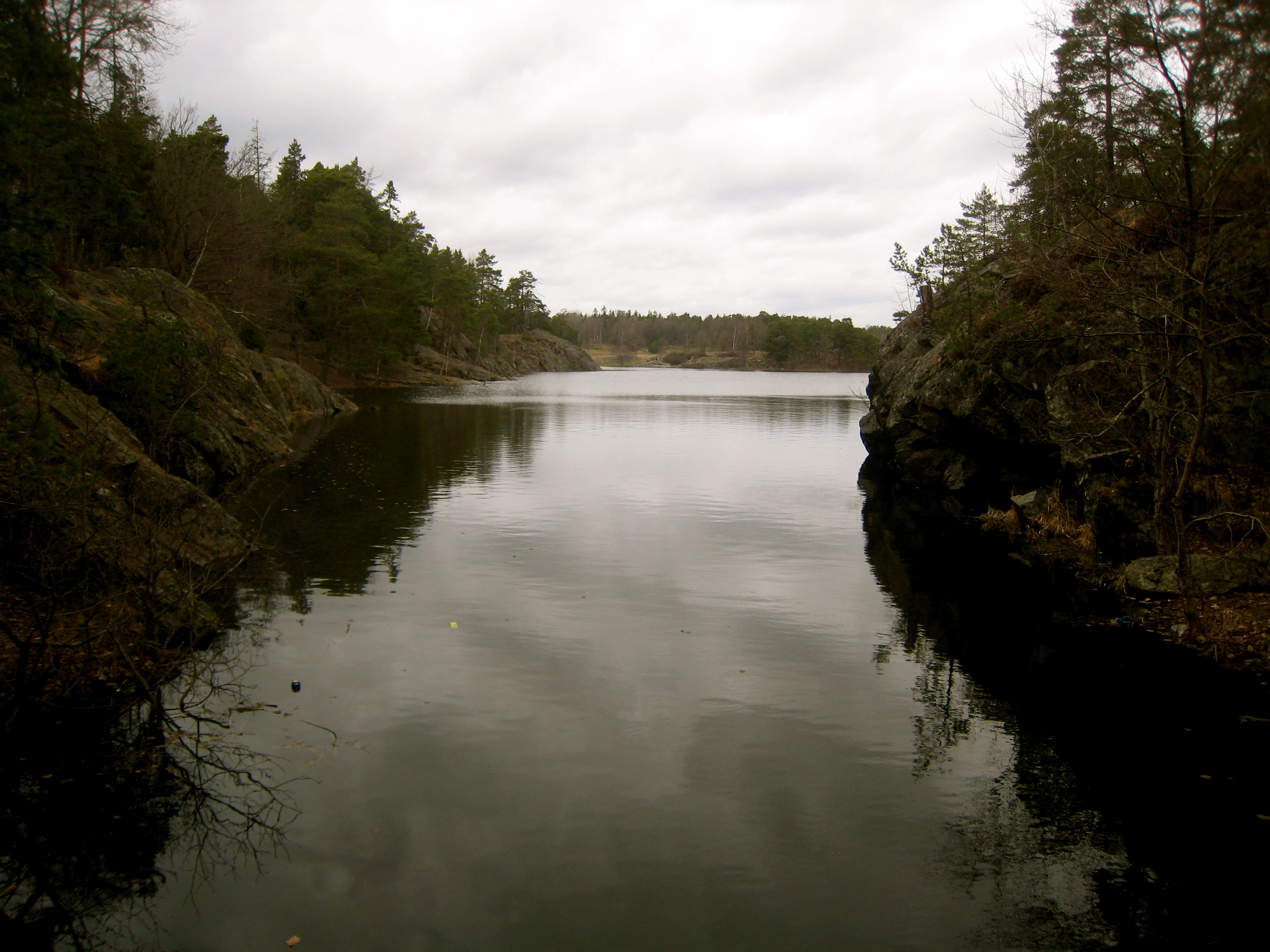 Söderbysjön